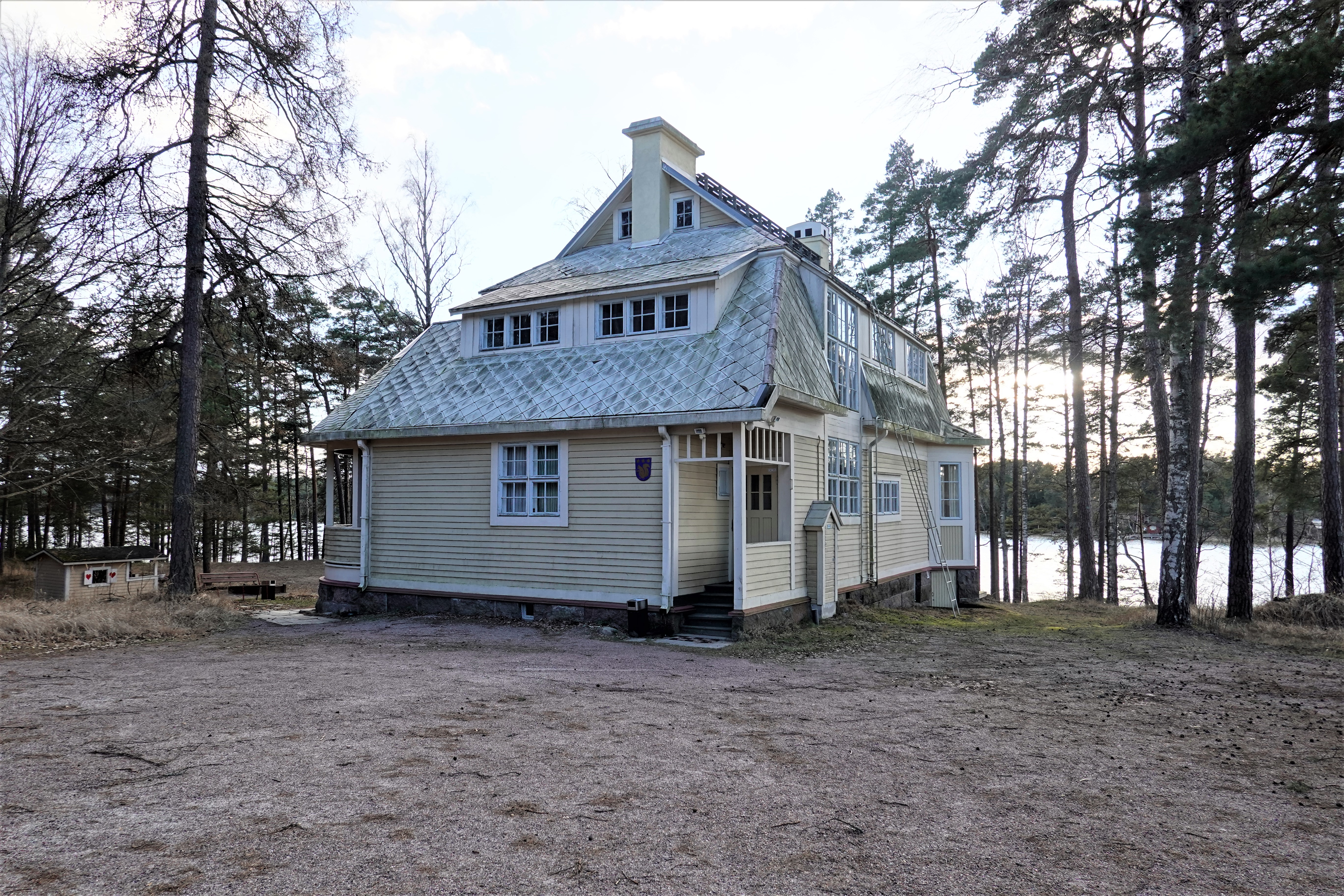 huvila mantereelta rantaan päin, sivuovi, mansardikatto, mäntymetsää